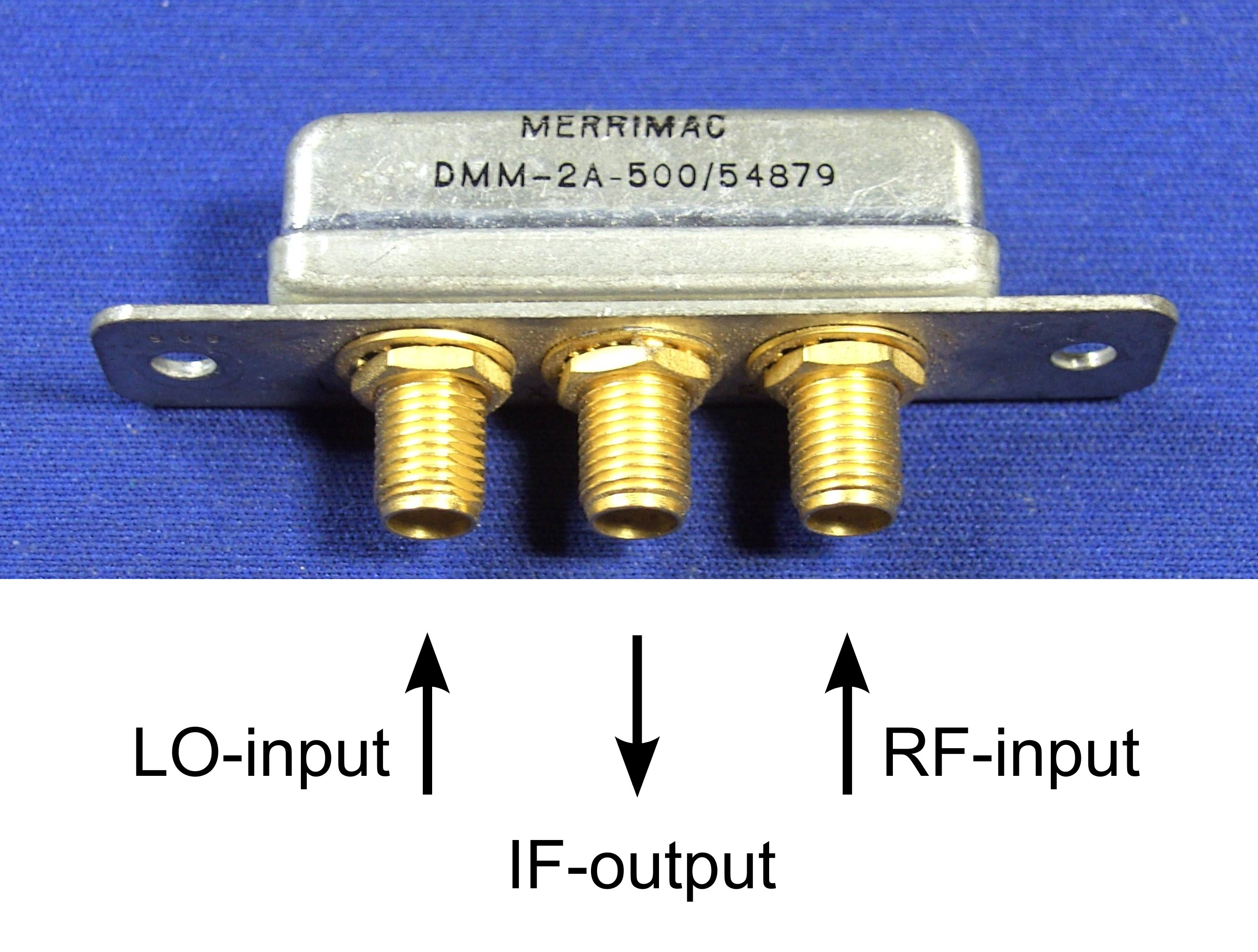 Schottky-dioden Ringmischer für den UHF-Bereich mit SMA-Anschlüssen